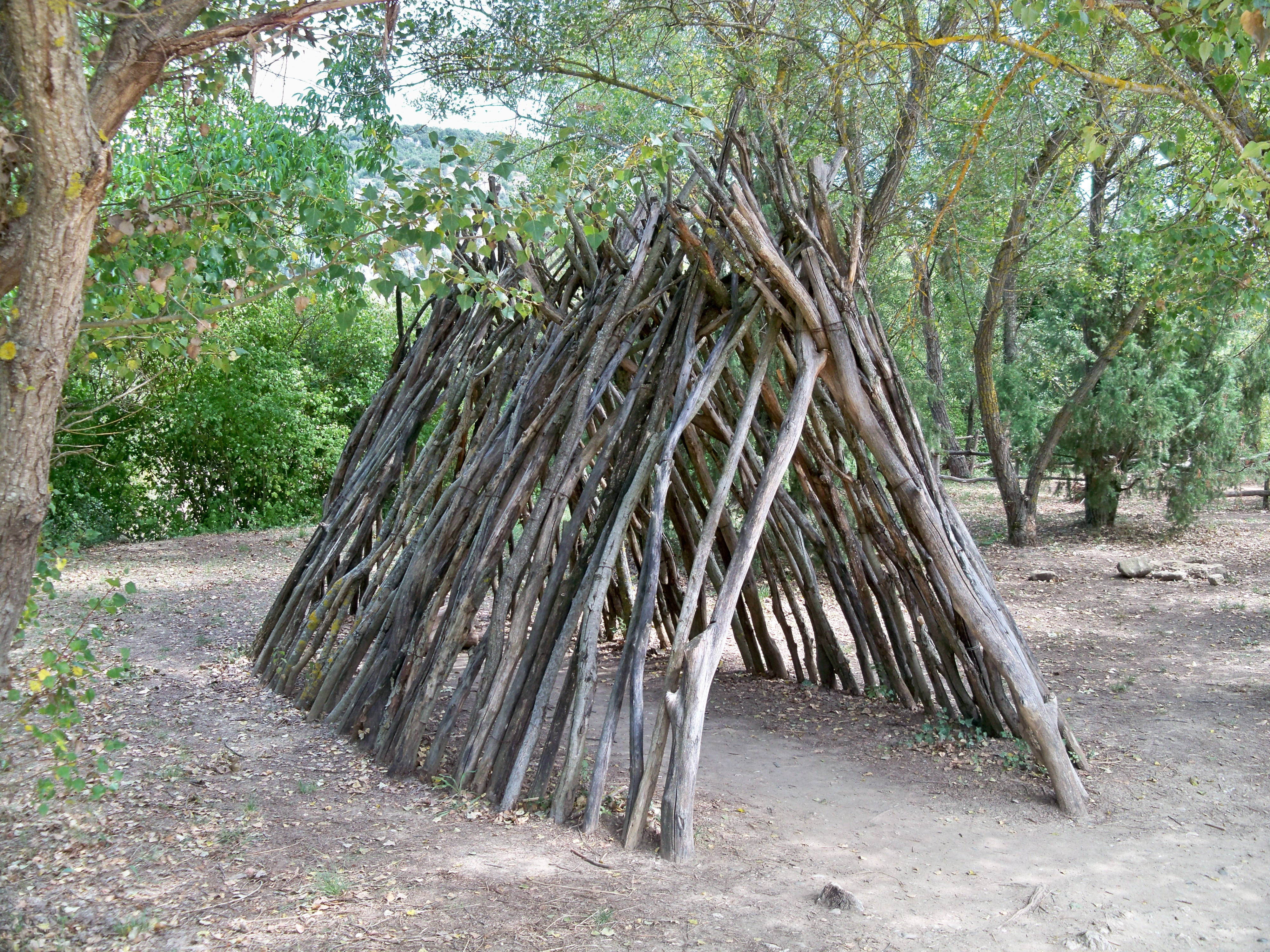 Reconstitution d'habitation à Quinson (04), France